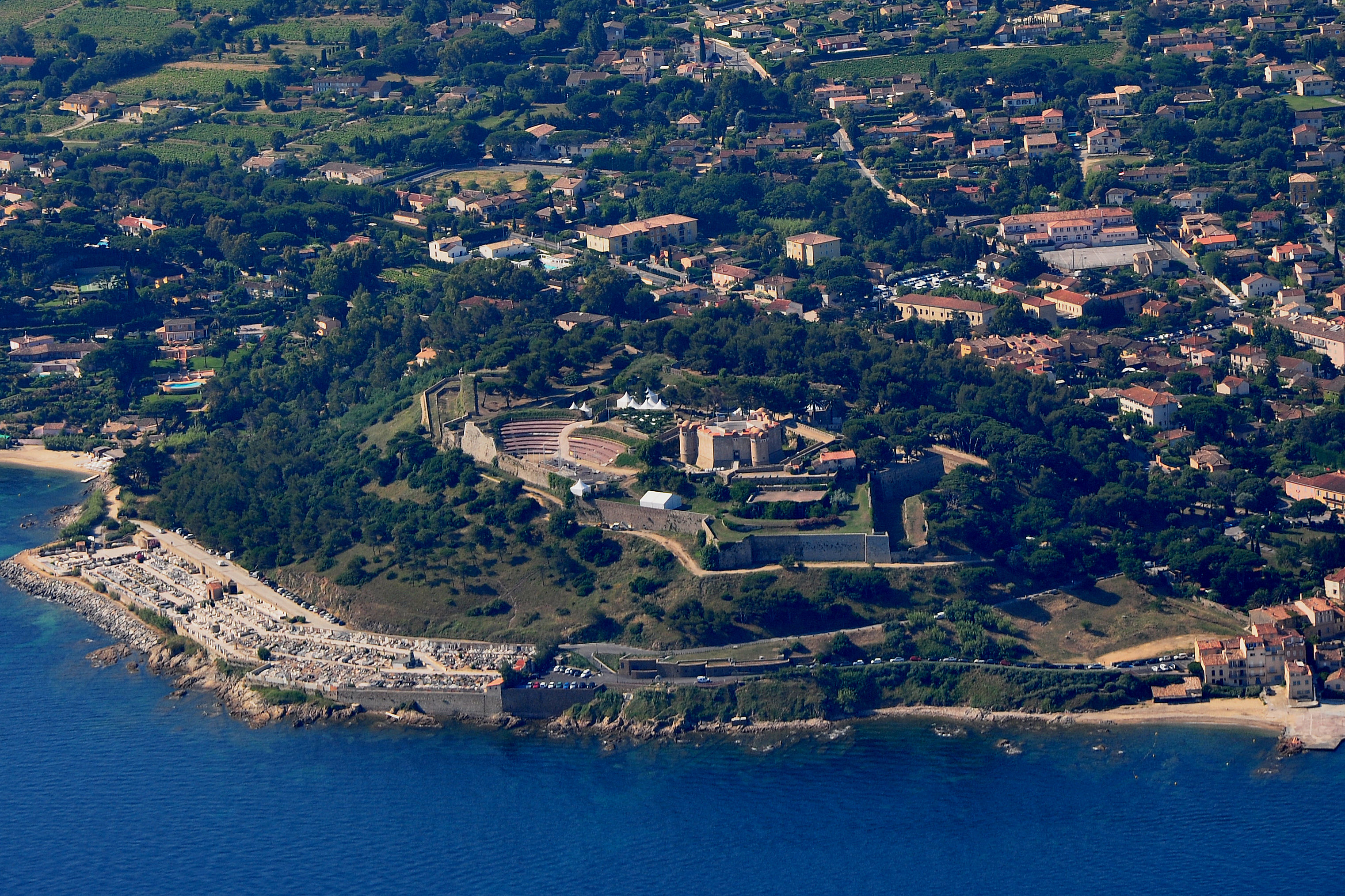 Vue aérienne de la Citadelle de Saint-Tropez